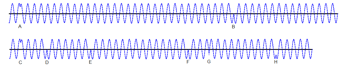 Beispiele für Kohärenzlängen